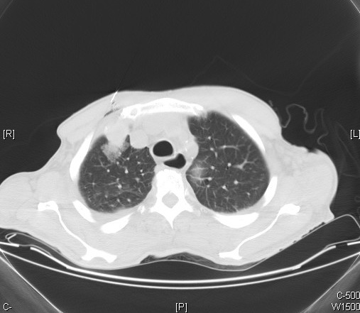 Metastatic renal cell carcinoma - CT scan - Case 262